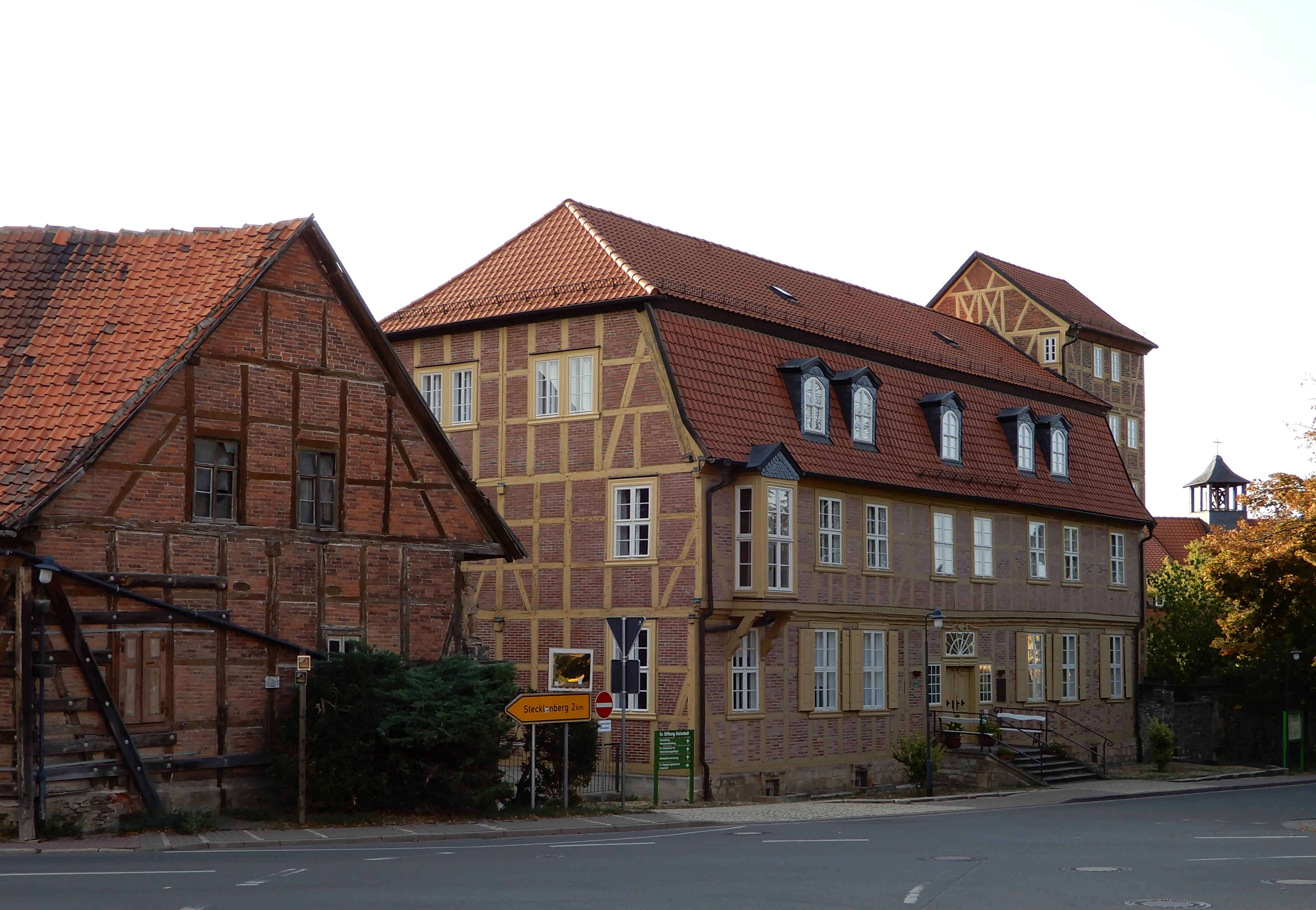 Lindenhof der Neinstedter Anstalten (Neinstedt)